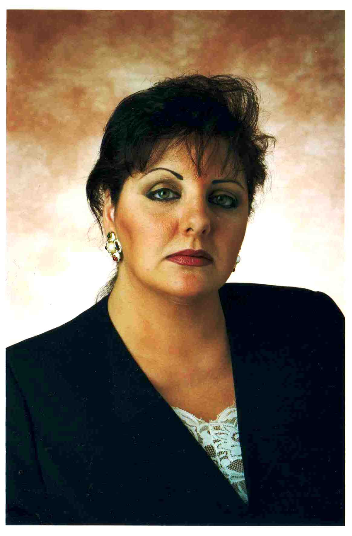 Soprano